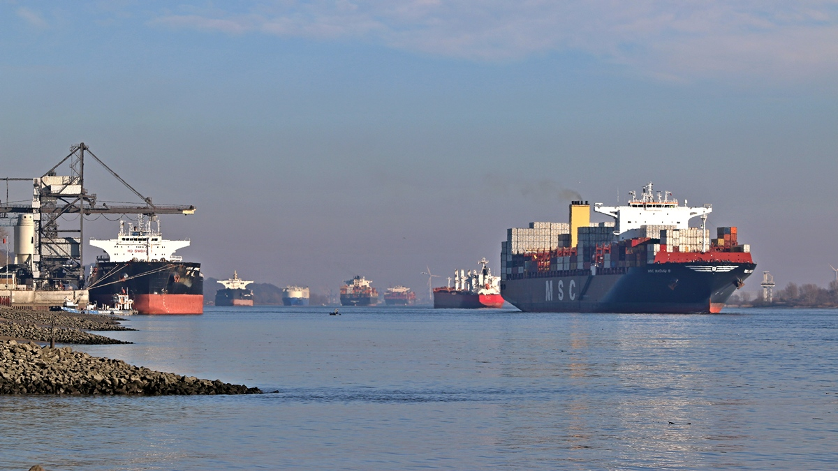 Große Frachtschiffe auf der Elbe in Hamburg